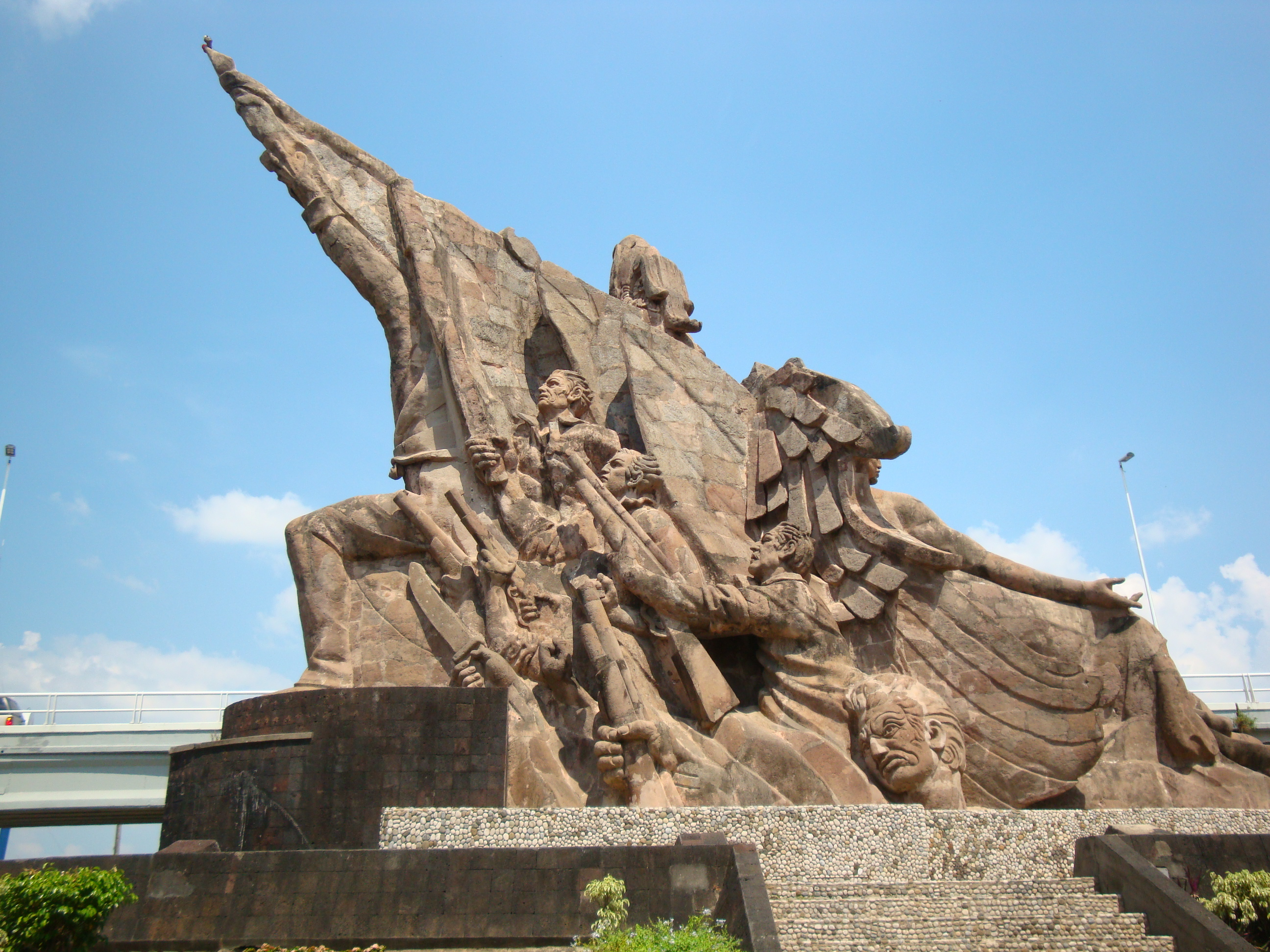 Fachada posteriór del monumento al Coronel Andrés Sánchez Magallanes, en la ciudad de Villahermosa, Tabasco, México.